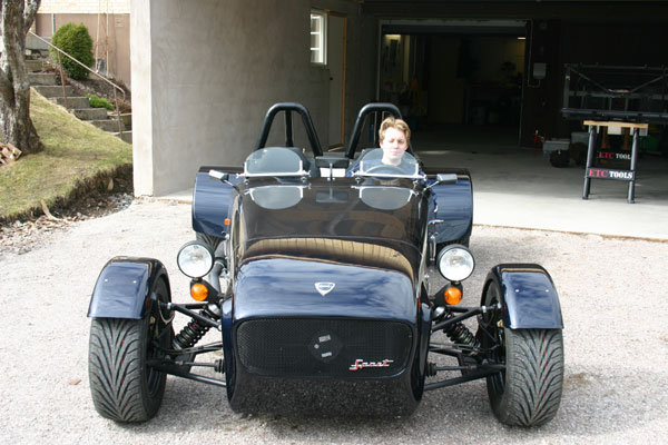 Dala 7